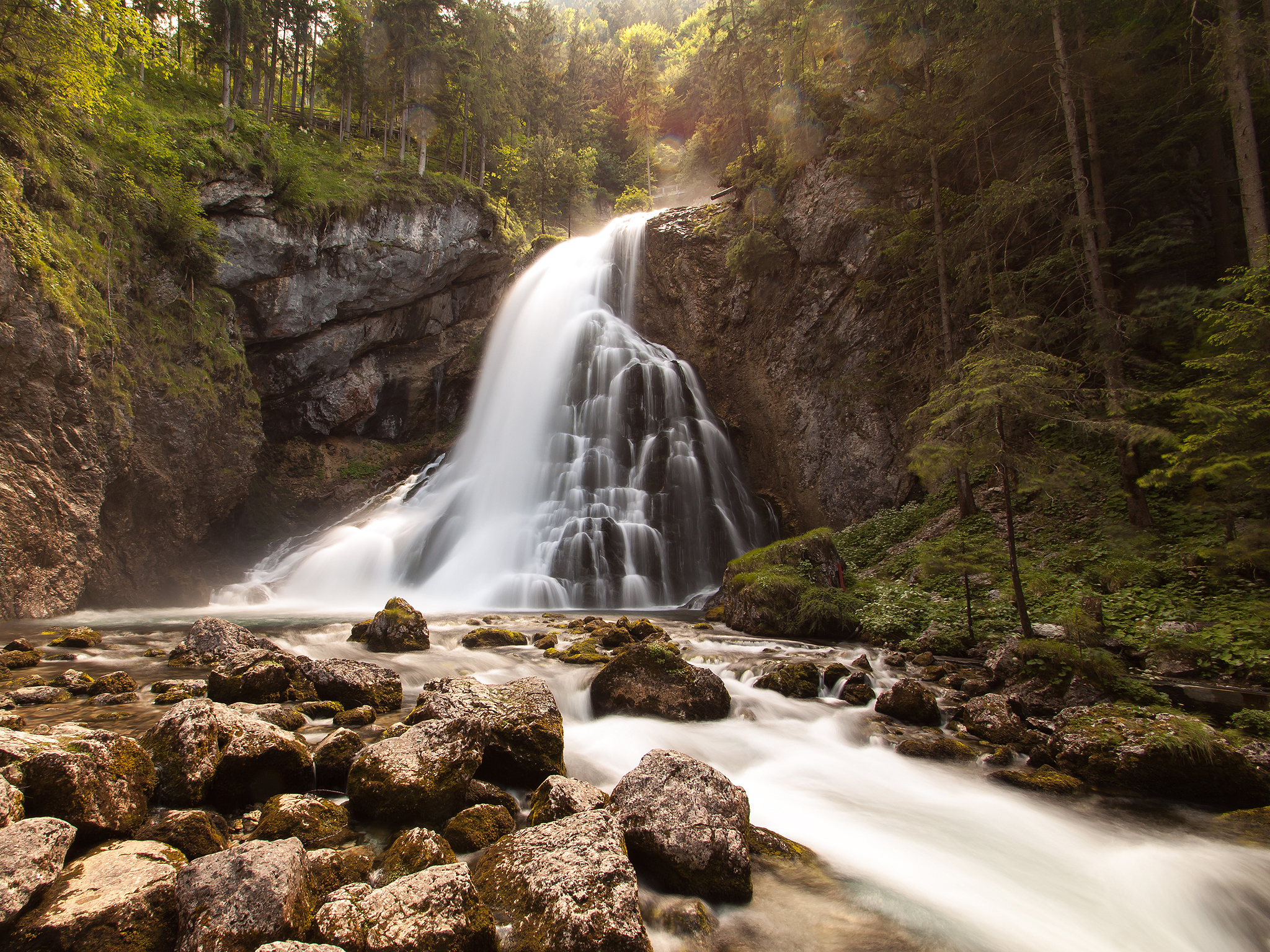 Gollinger Wasserfall This media shows the natural monument in Salzburg with the ID NDM00197.